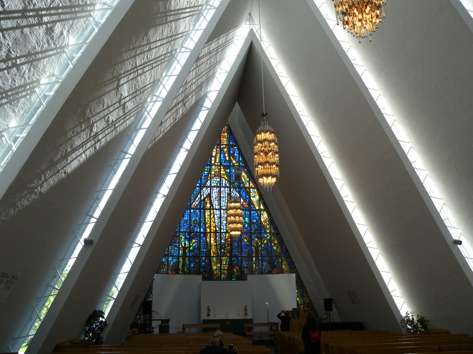 Eismeerkathedrale in Tromsø